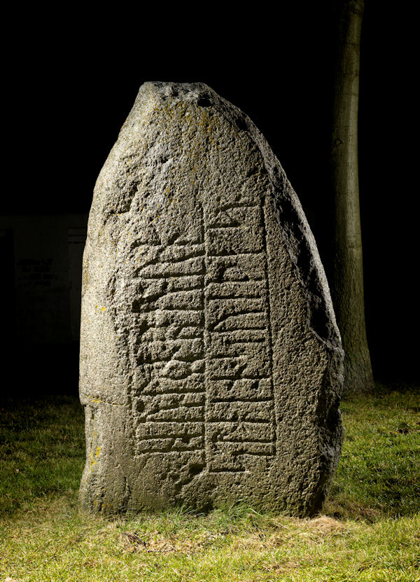 Foto af Roberto Fortuna